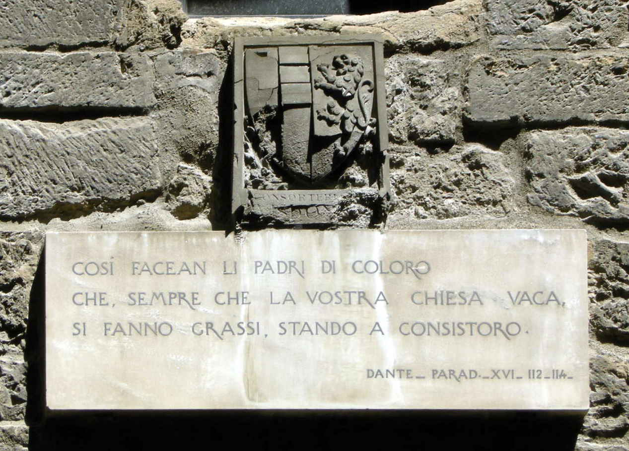 Torre dei visdomini 23, targa dantesca